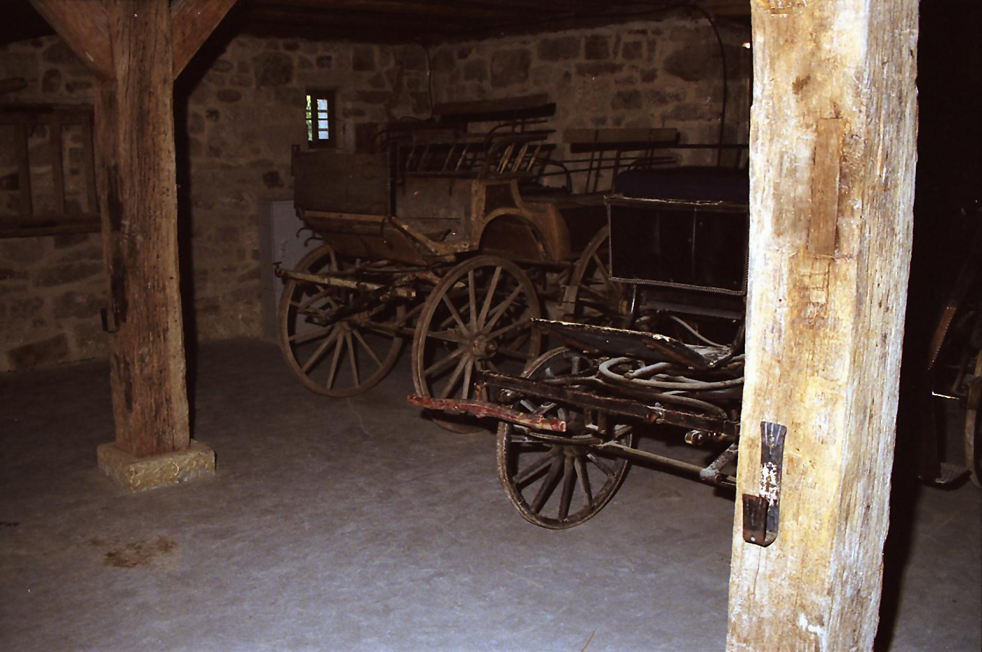 Wagenremise des Steigengasthauses aus Michelfeld im Hohenloher Freilandmuseum